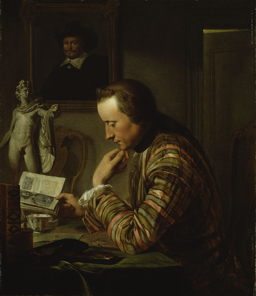 schilderij; portret Amsterdam; mansportret; japonse rok; Huydecoper van Maarsseveen, Joan